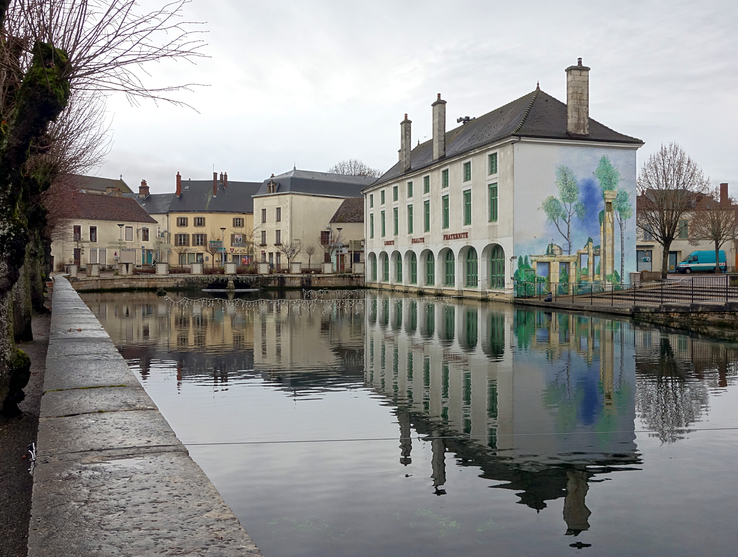 La mairie de Laignes et la résurgence de la Laigne.